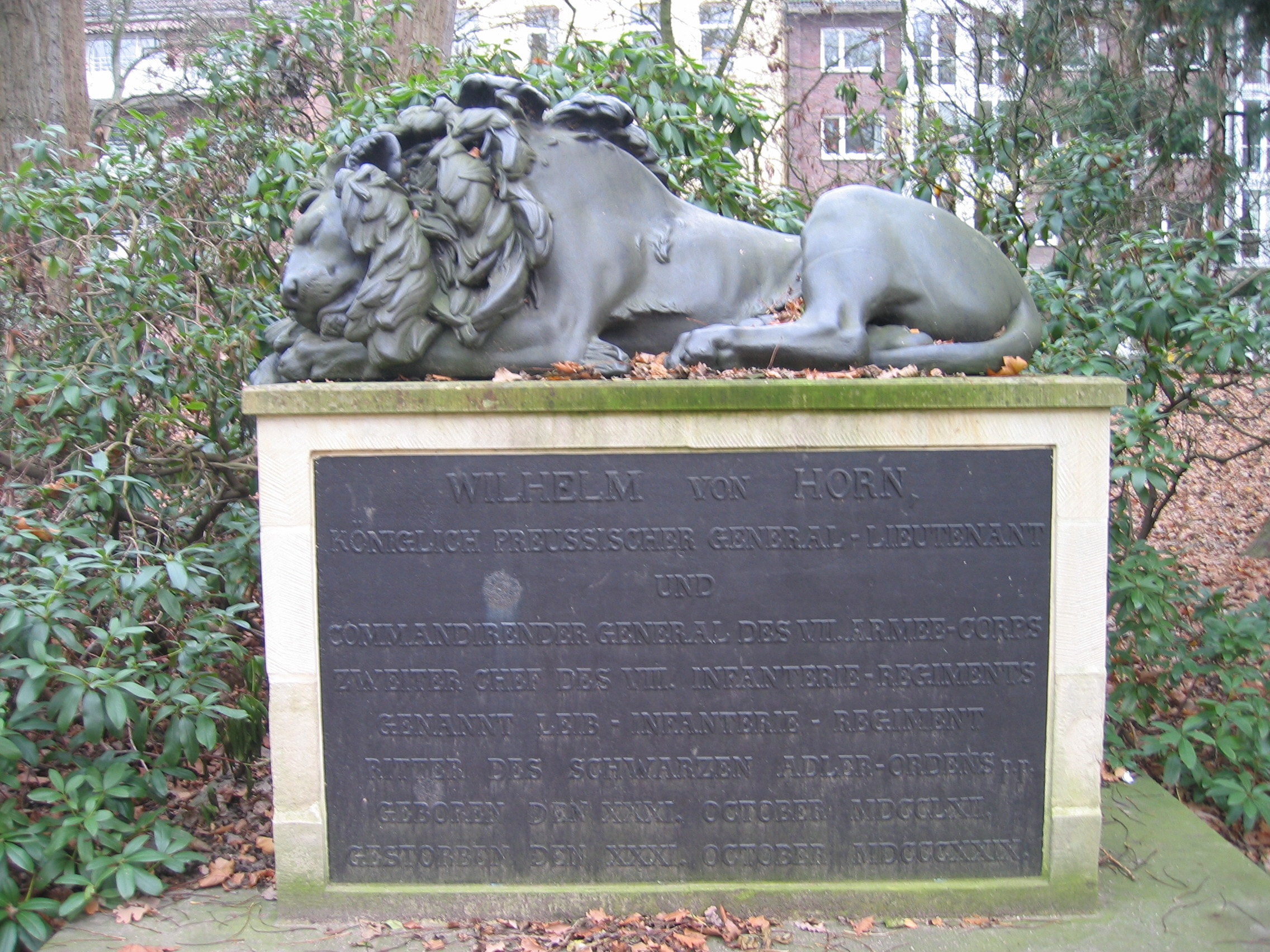 Das Grab von Heinrich Wilhelm von Horn in Münster i. W. Fotografiert von Werner B. Sendker